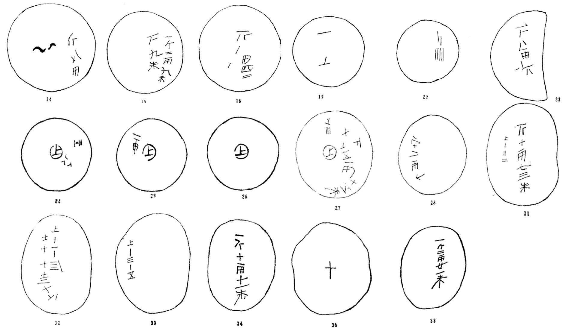 南窑庄金饼铭文